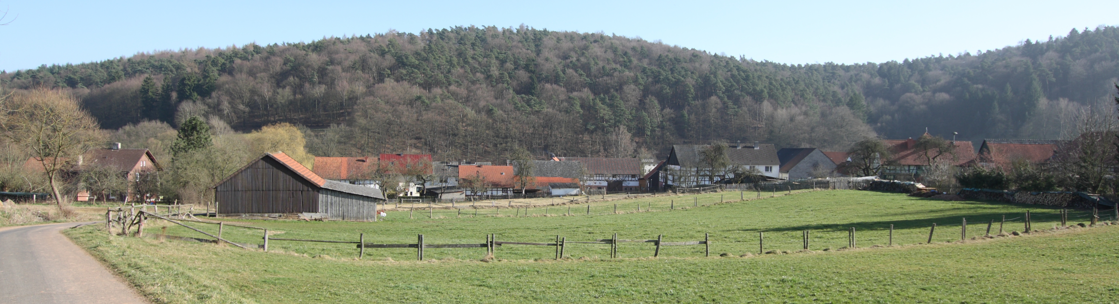 Blick auf Gershausen aus nördlicher Richtung